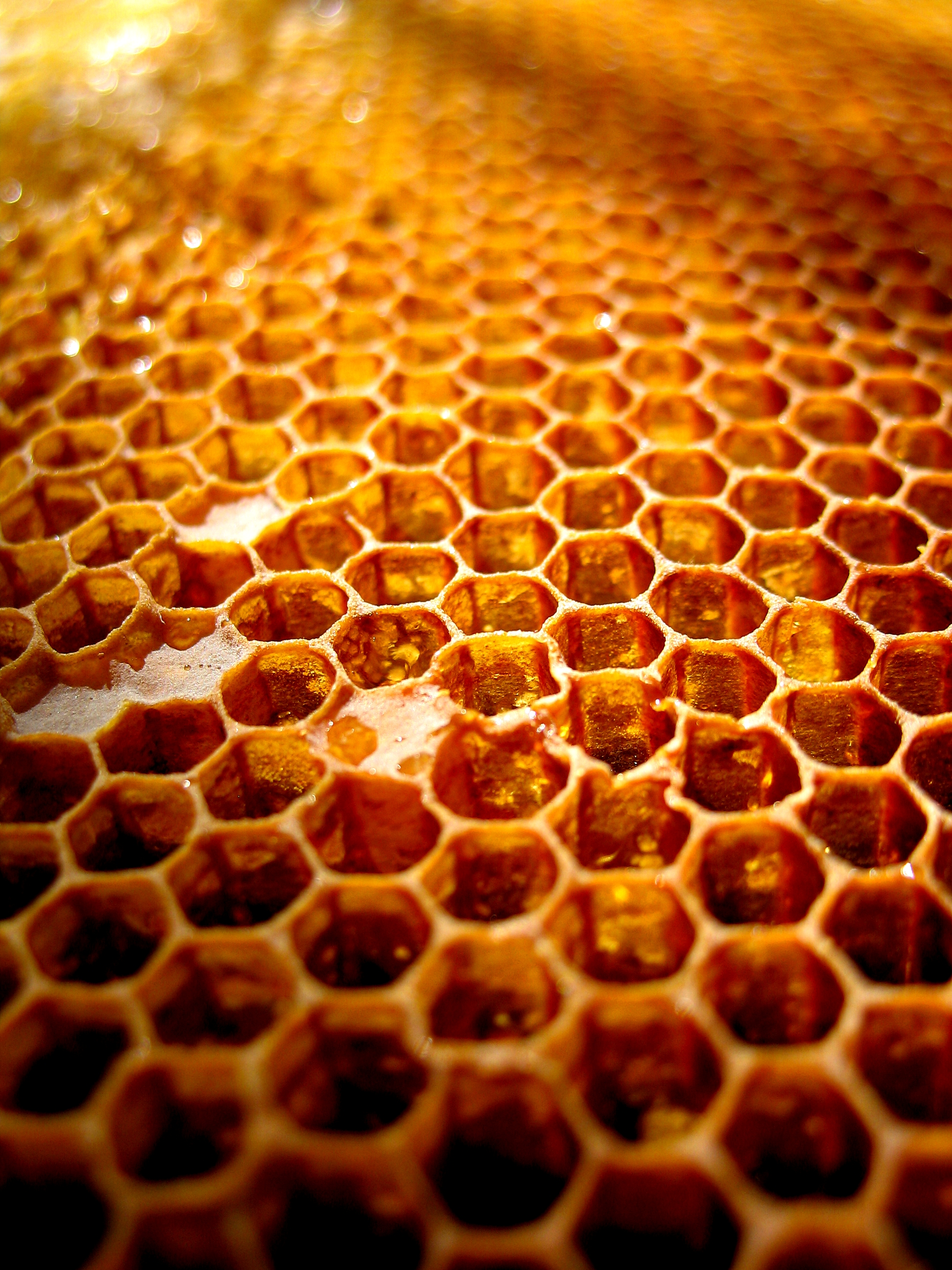 Mesilaskärg. Näha mõned kärjekannu kaaned